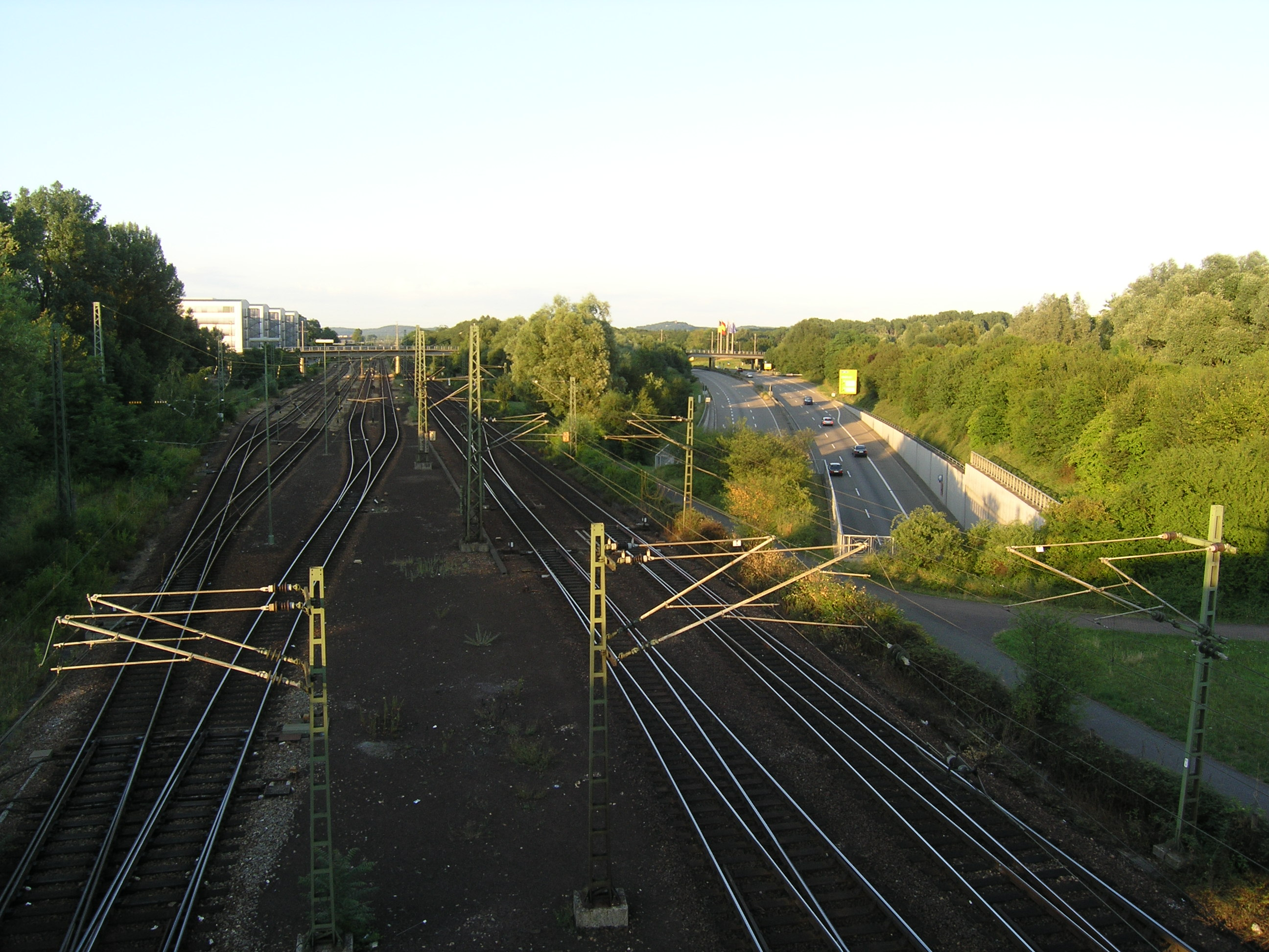 Karlsruhe, Rangierbahnhof und Südtangente, quer darüber die Albtalbahn